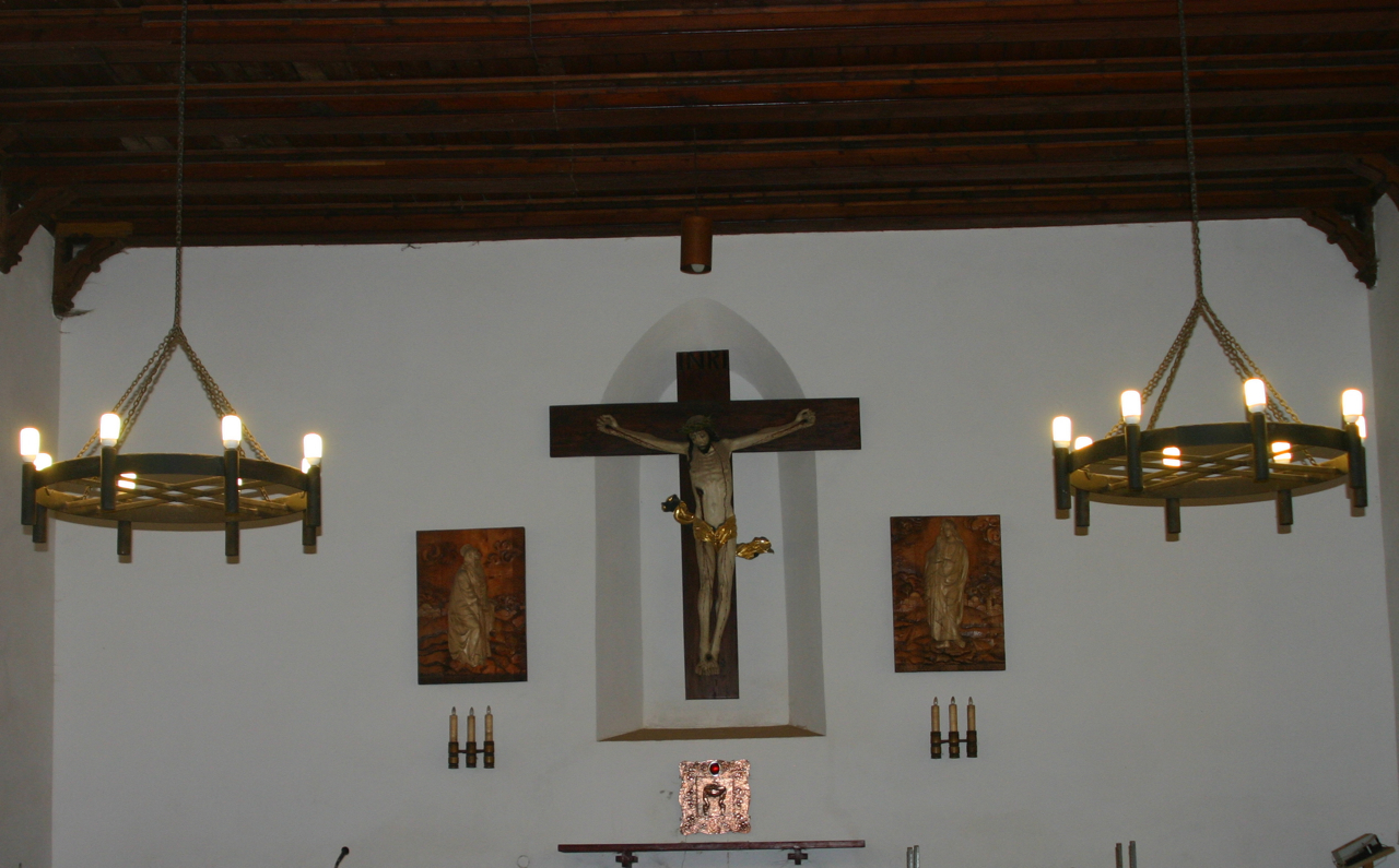 Czerniki - kościół parafialny, obecnie rzymskokatolicki filialny p.w. św. Jana Ewangelisty, kon. XIV, XVIII